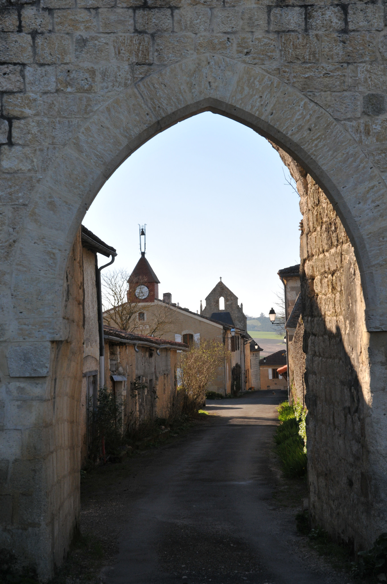 Saint Arailles Village Gers France